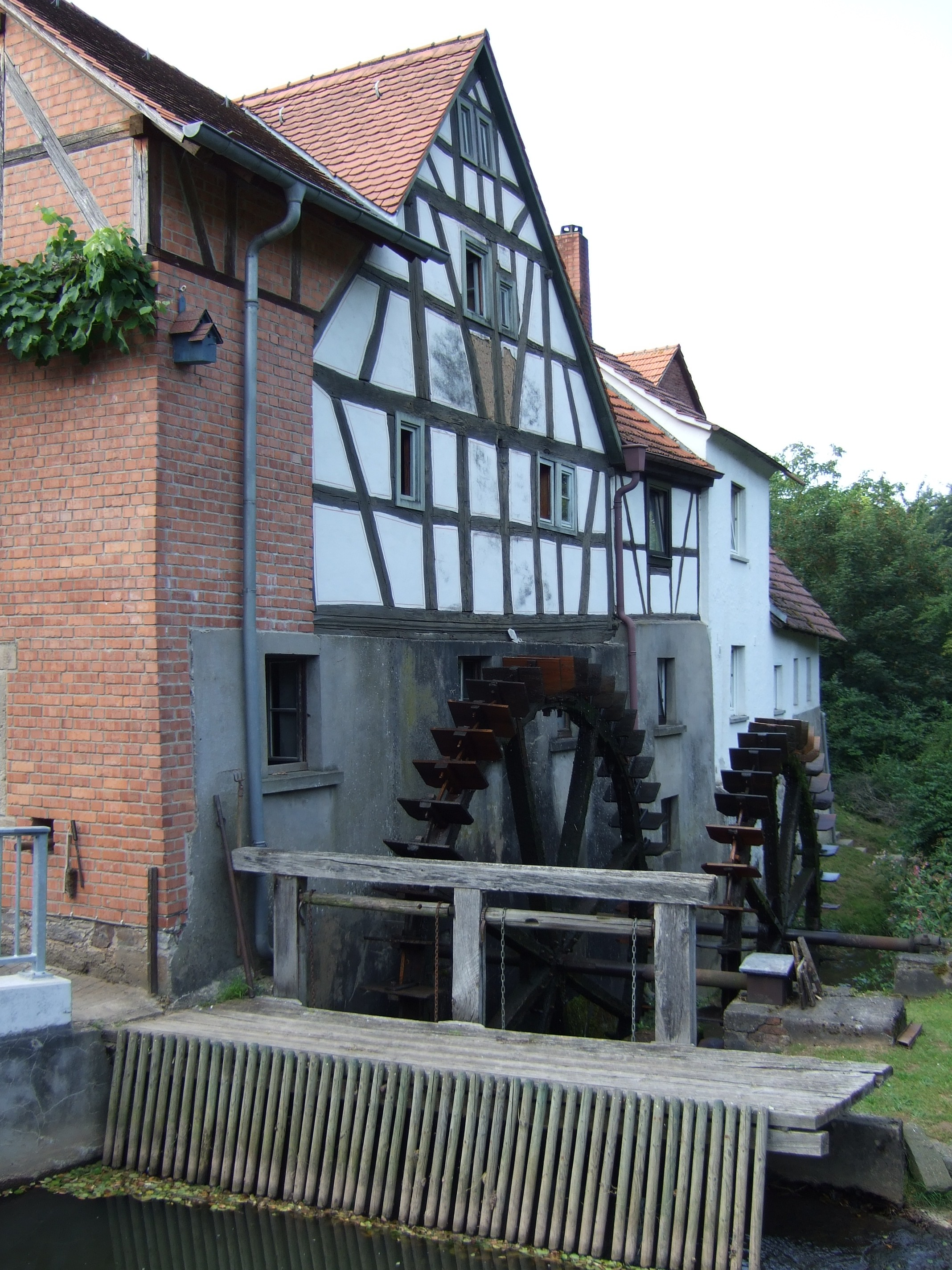 Die Strötzbacher Mühle